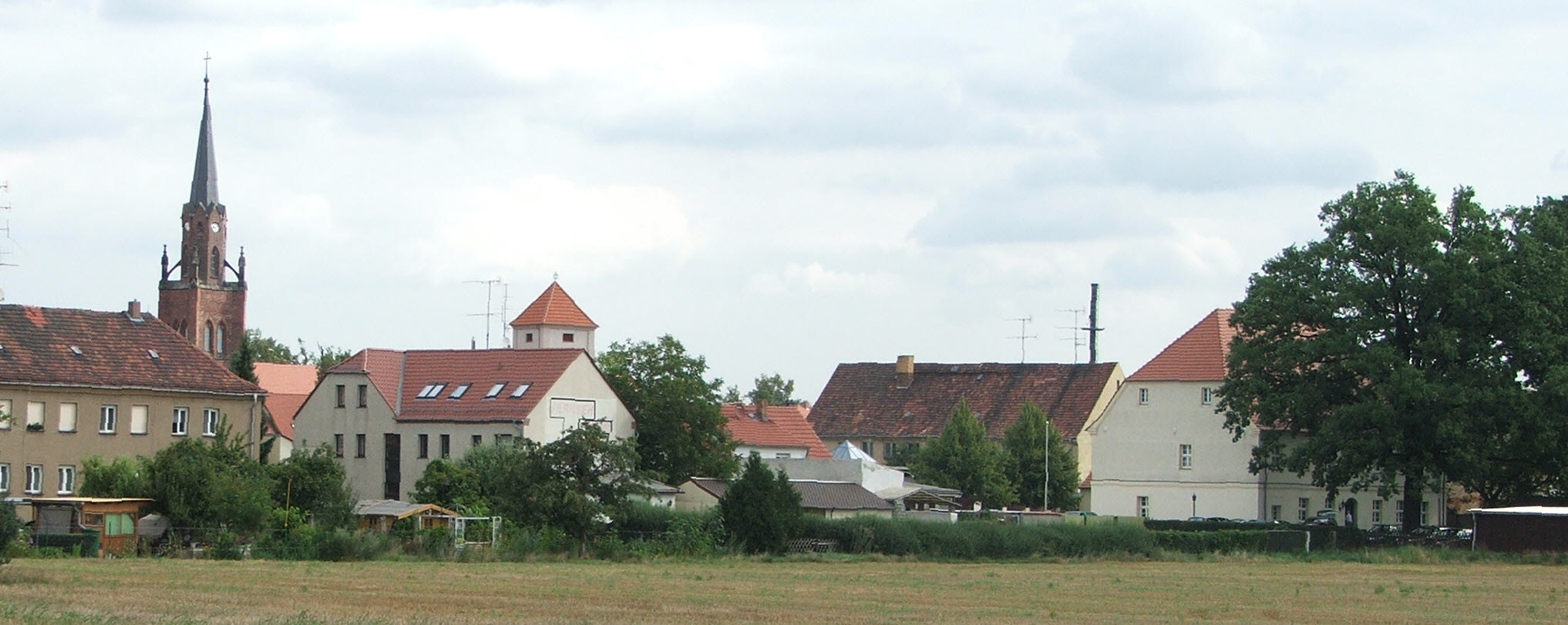 Schliebener Amtsgebäude von Süden